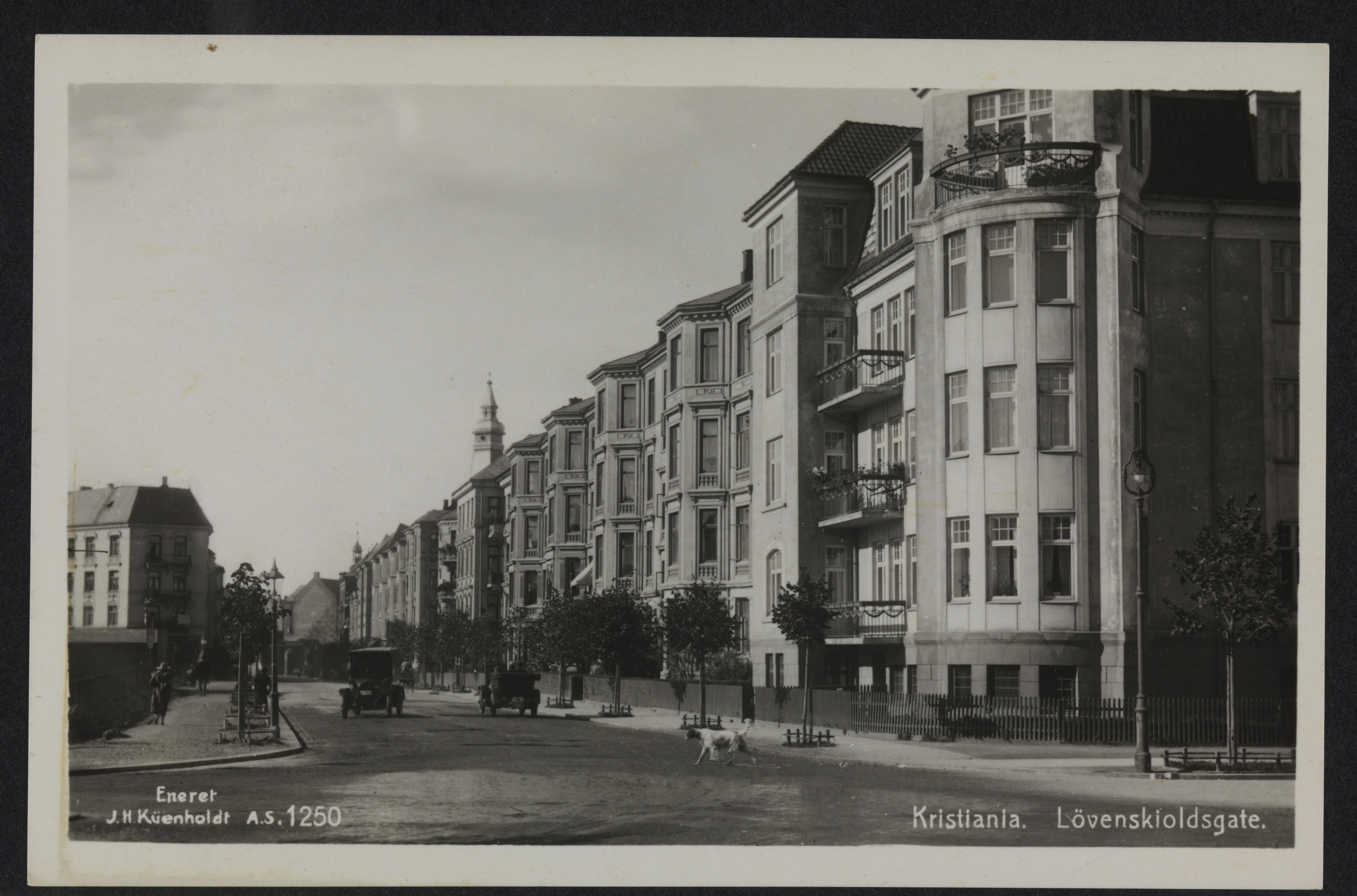 Bildet er hentet fra Nasjonalbibliotekets bildesamling Løvenskiolds gate,Uranienborg, Oslo, Oslo